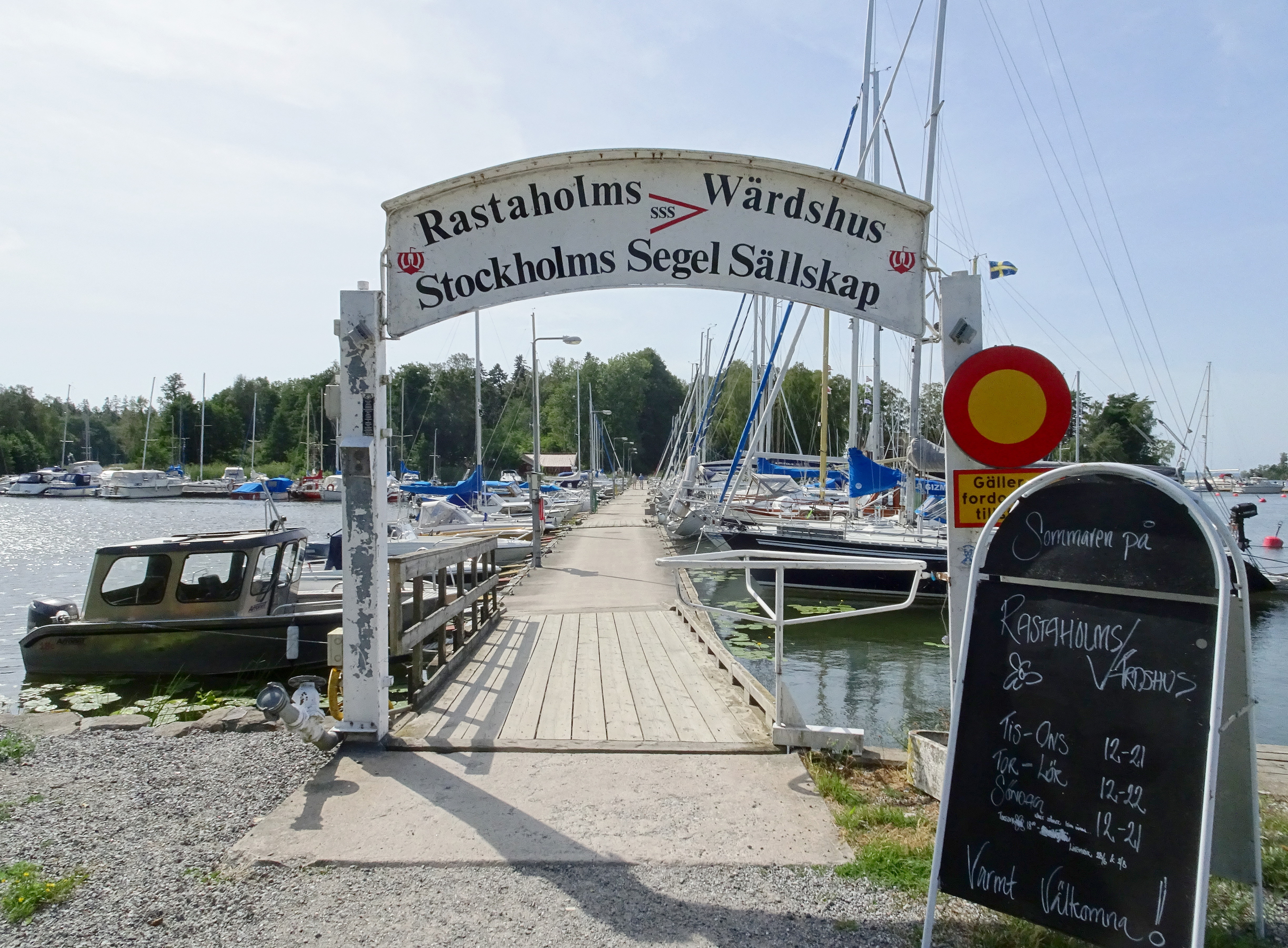 Rastaholms brygga